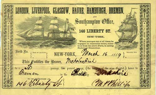 Ticket für eine Schiffspassage mit einem Schiff der Black Ball Line